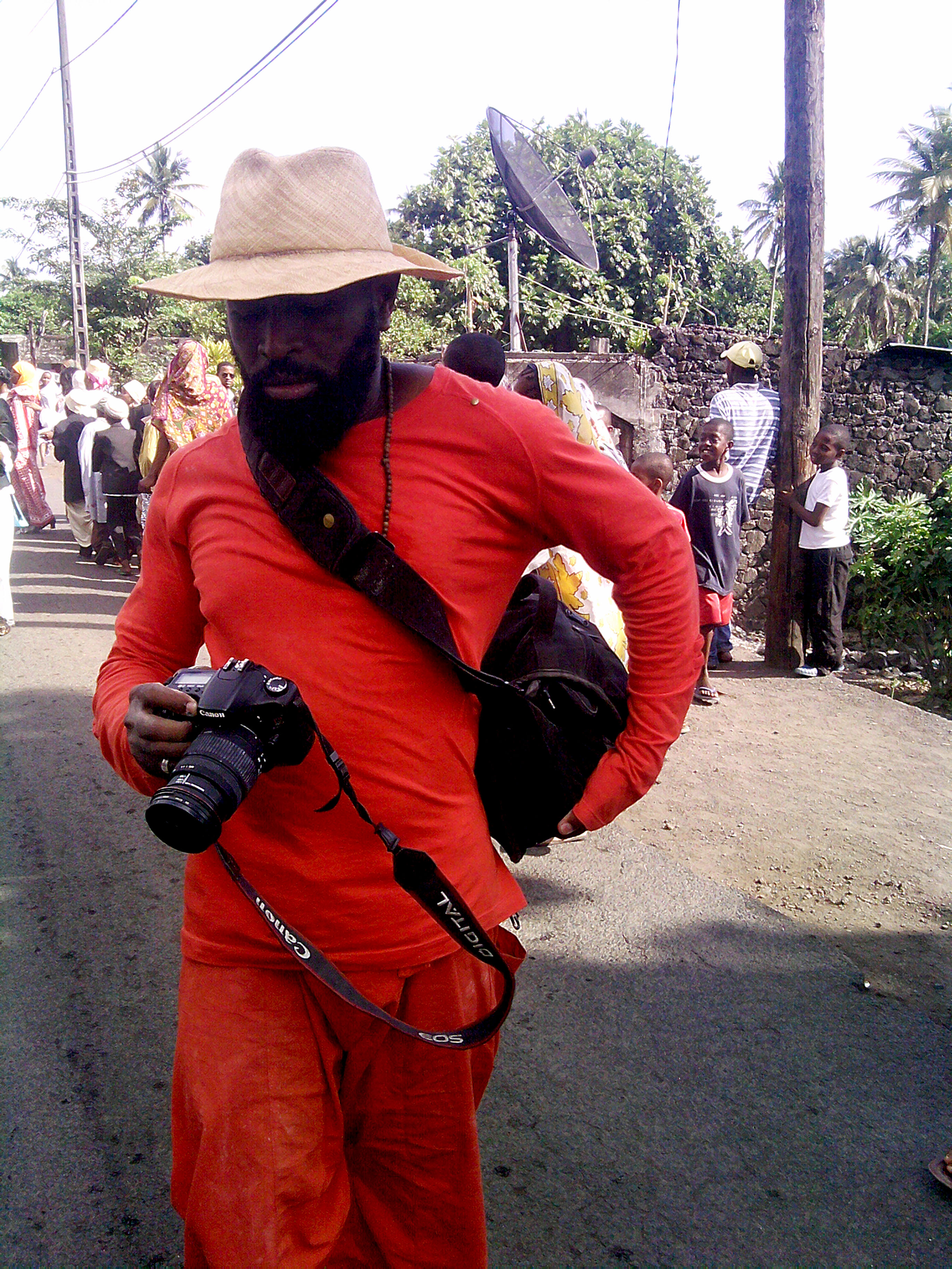 Soeuf Elbadawi à Mitsudje aux Comores lors de la tournée O Mcezo* 2009